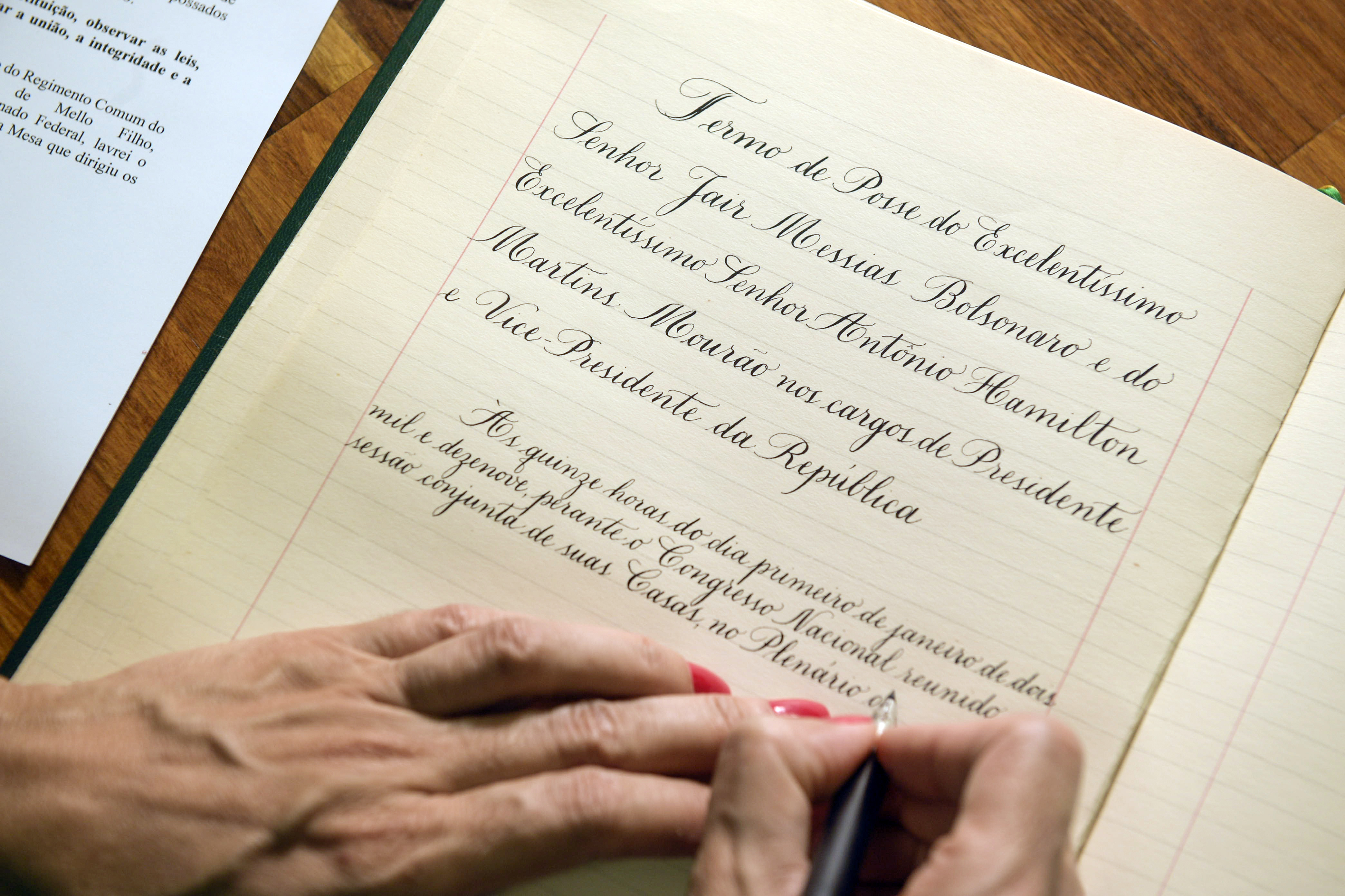 Senado preserva os livros que registram posses presidenciais desde 1891. Ao assinar o livro, o presidente eleito assume o compromisso de governar o país e defender a Constituição, dando prosseguimento à linha do tempo que vem sendo traçada desde 26 de fevereiro de 1891. O acesso aos dois volumes é restrito com o intuito de resguardar o patrimônio.Os documentos ficam guardados no Arquivo do Senado, em uma sala com temperatura, umidade e luminosidade submetidas a parâmetros rigorosos. Organizados em dois volumes pela Coordenação de Arquivo, esses documentos testemunham a evolução histórica da língua portuguesa, a partir de elementos como a perda sucessiva de arcaísmos. Calígrafa Andréa Branco escreve o termo presidencial, pois devido à rotina de trabalho, não há condição de escrever o termo enquanto acontece a posse.Foto: Pedro França/Agência Senado